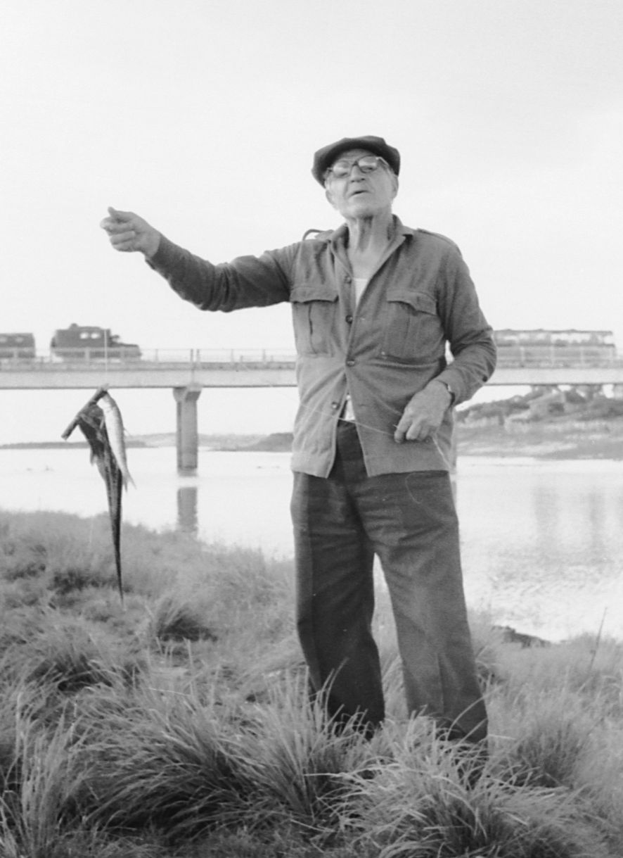 Рыболов держит рыбу на кукане. 1977 год.